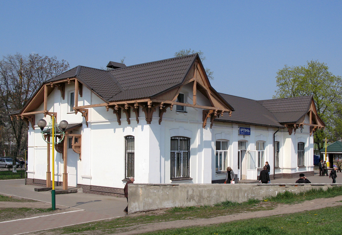 Вокзал ст. Ірпінь